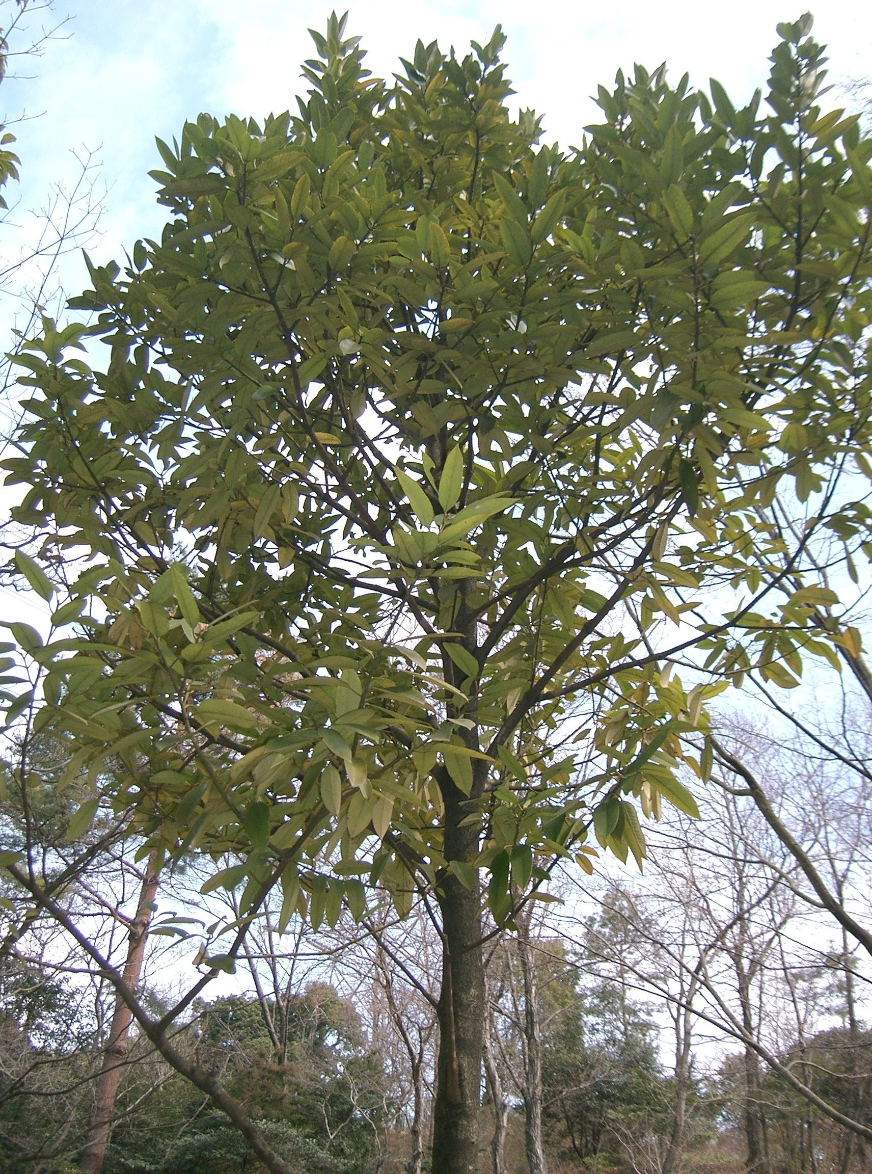 Ilex latifolia